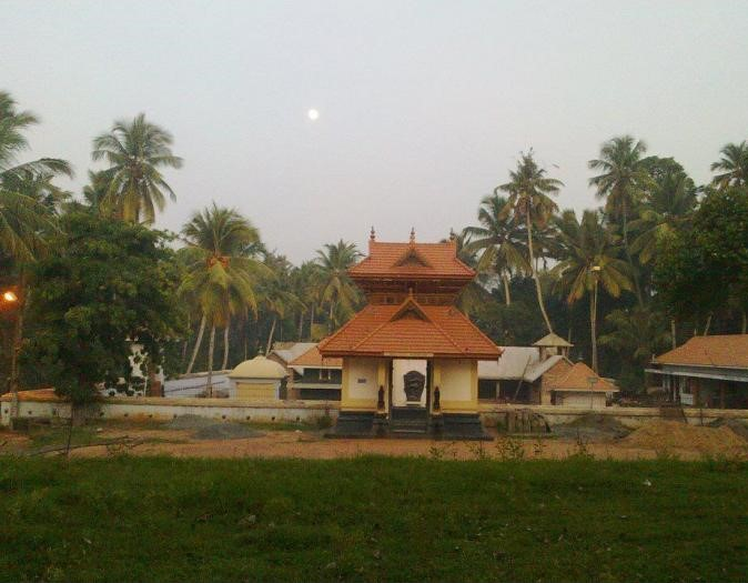 Arumanoor Nainar deva temple